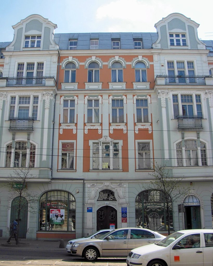 Kamienica ul. Gdańska 68 w Bydgoszczy